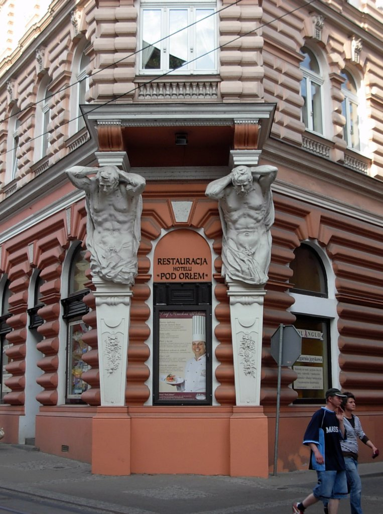 Hotel Pod Orłem w Bydgoszczy